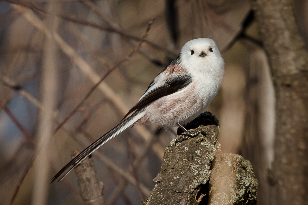 снято в Воронежской области